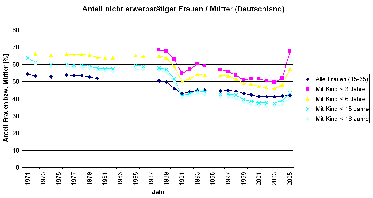 Die zeitliche Entwicklung des Anteils der nicht erwerbstätigen Mütter in Deutschland.